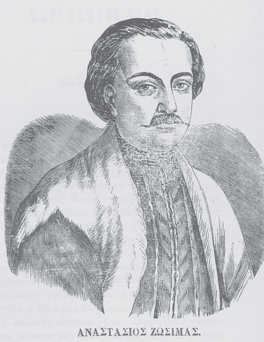 Anastasios Zosimas, Griechischer Stifter, 19. Jahrhundert